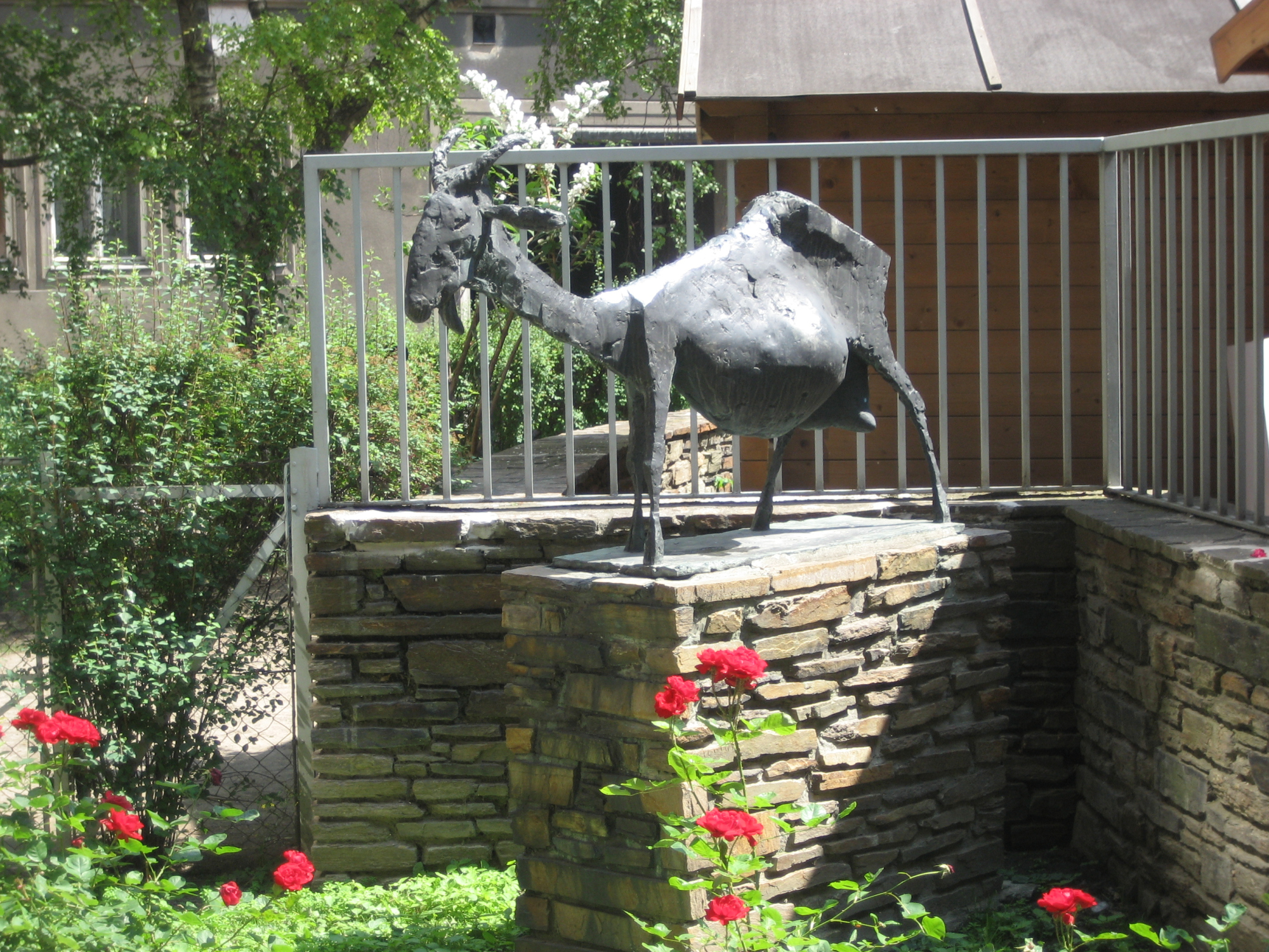 Freiplastik von Alois Heidel (Ziege, 1956) im Hof des Hauses Obere Donaustraße 95-97 in der Leopoldstadt, in Wien